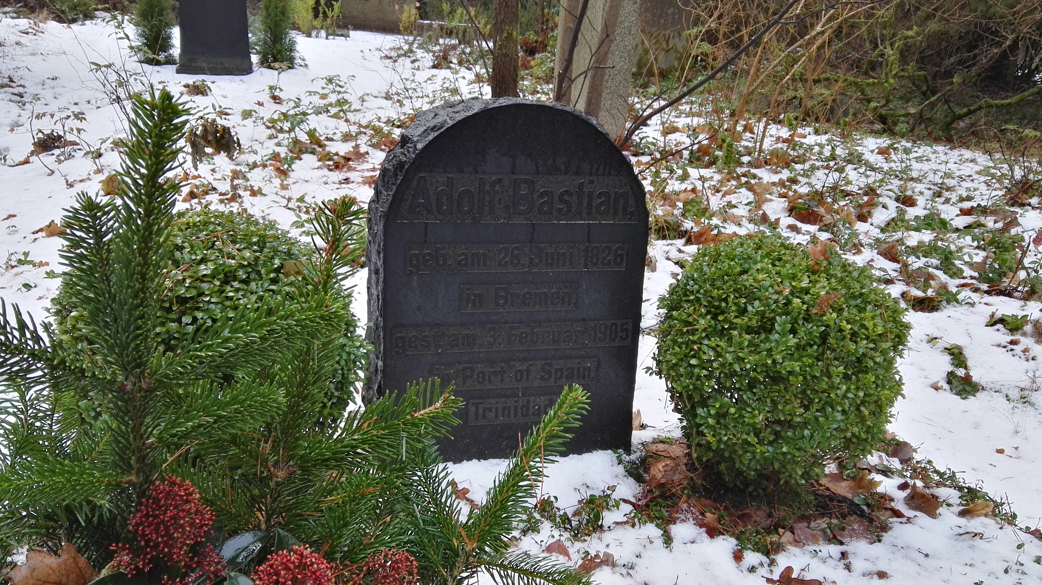 Grab von Adolf Bastian auf dem Südwestkirchhof Stahnsdorf; Ehrengrab der Stadt Berlin